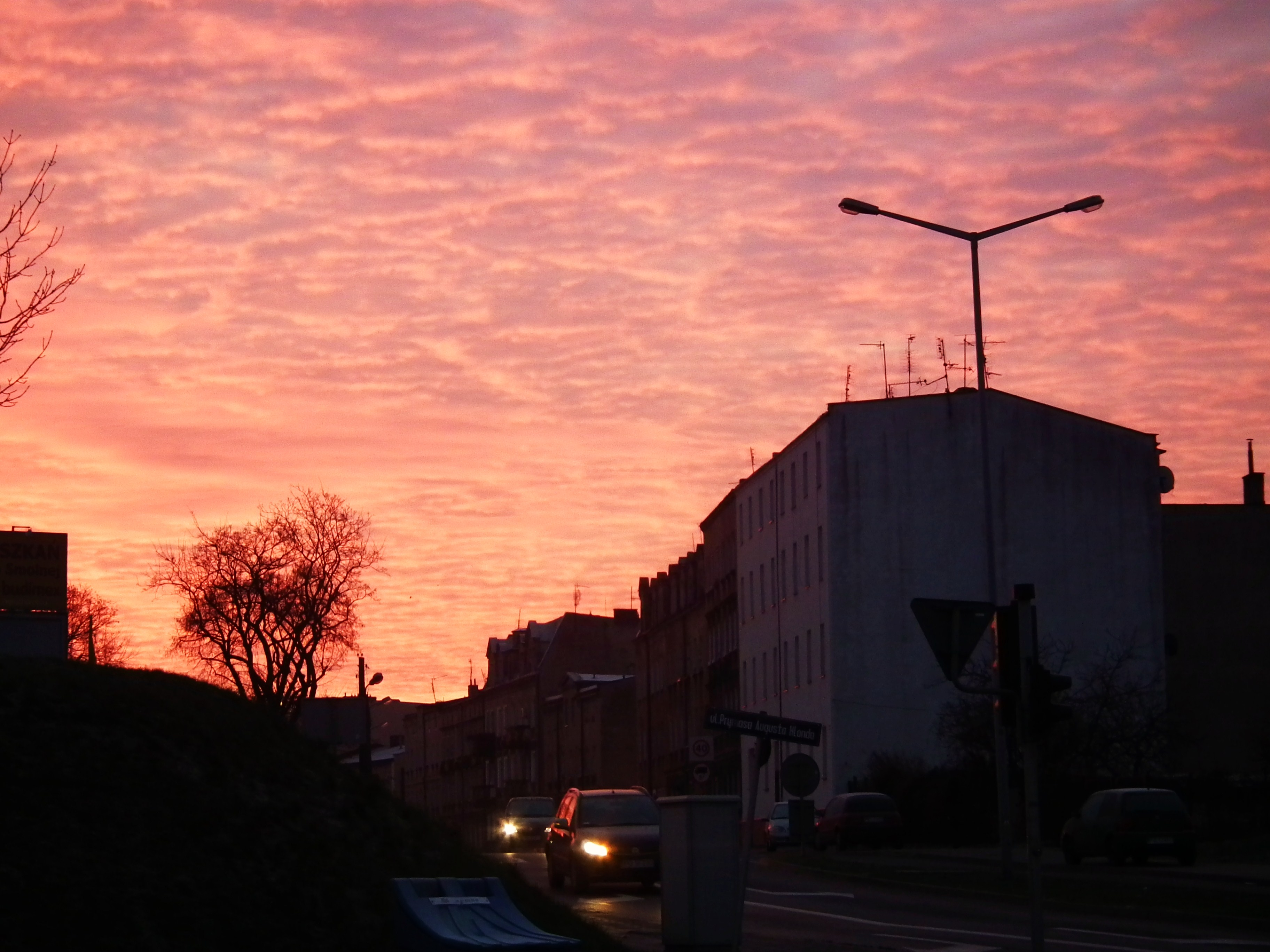 Świt nad Główną w Poznaniu.